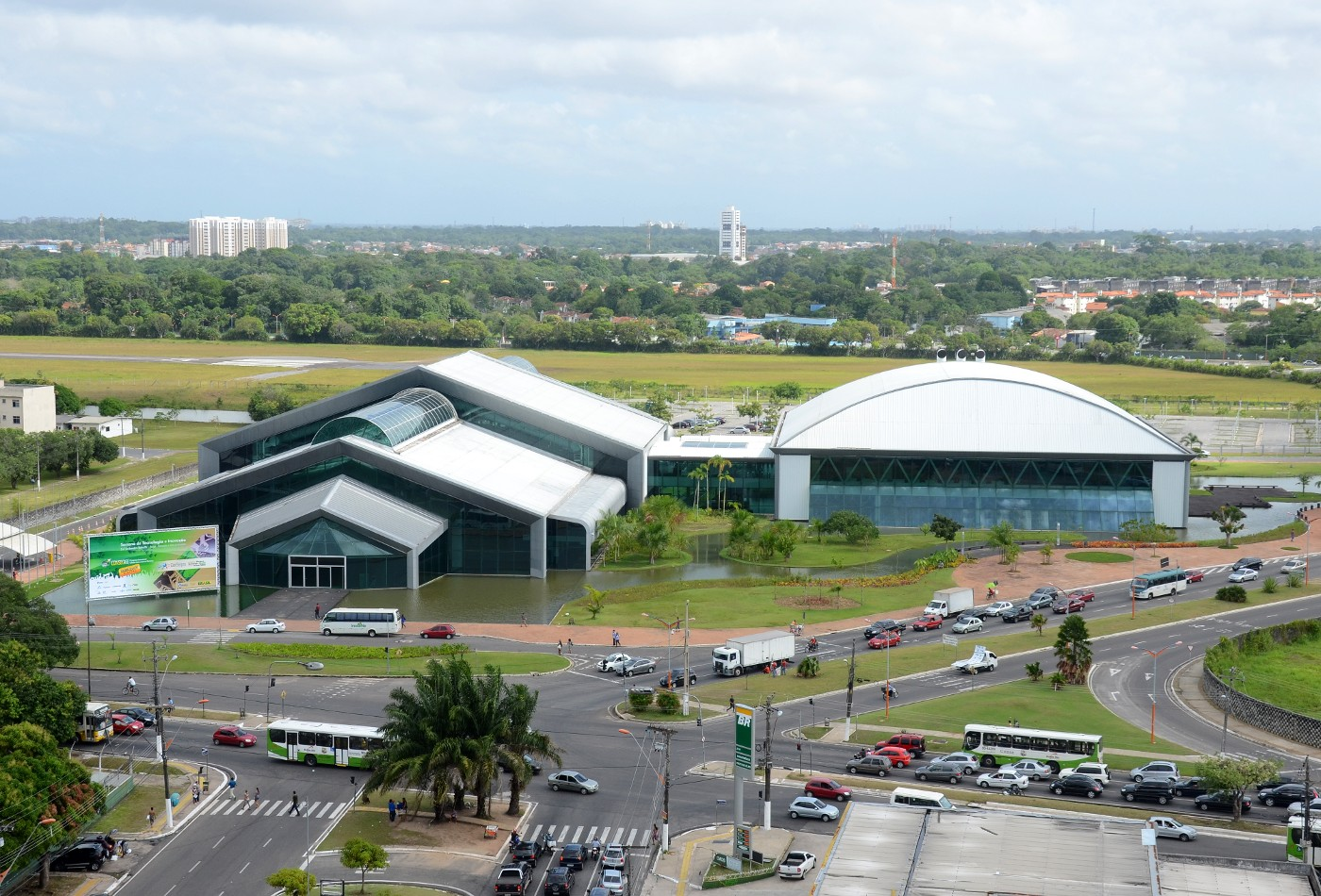 Imagen área del edificio en Belém Do Pará donde se realizó el CONSEGI 2012